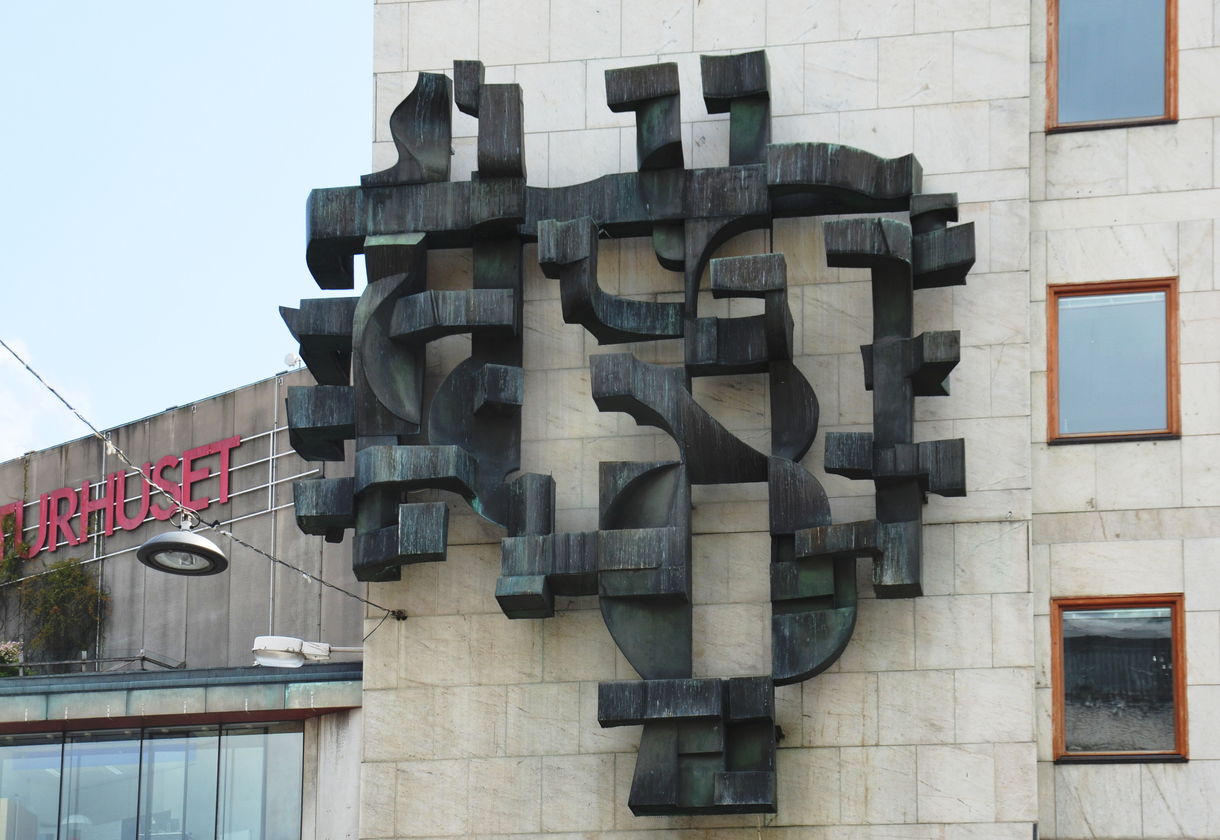 Svens Sahlberg, koppar, Klarabergsgatan 23 i Stockholm